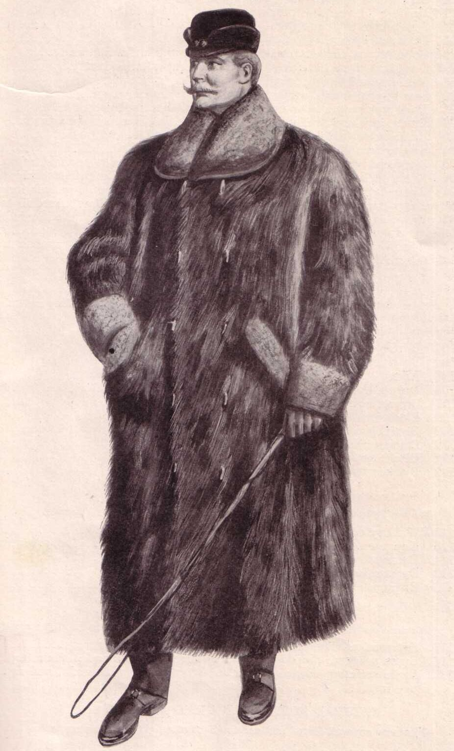 Fur Retail Trade Lanpher Furs; Black Chinese Dog Coat, Nutria Collars and Cuffs. Herrenmantel aus schwarzen chinesischen Hundefellen mit Nutriakragen und -Manschetten. (Bildausschnitt)